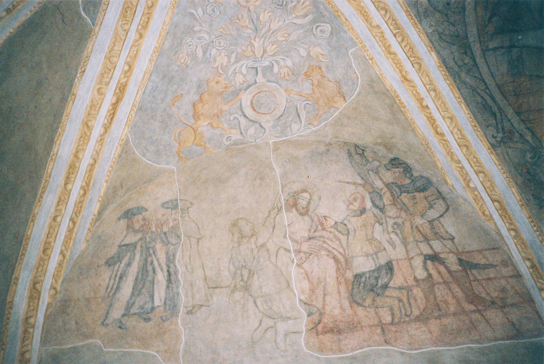 kamienica Gruszewiczów - wnętrze 15